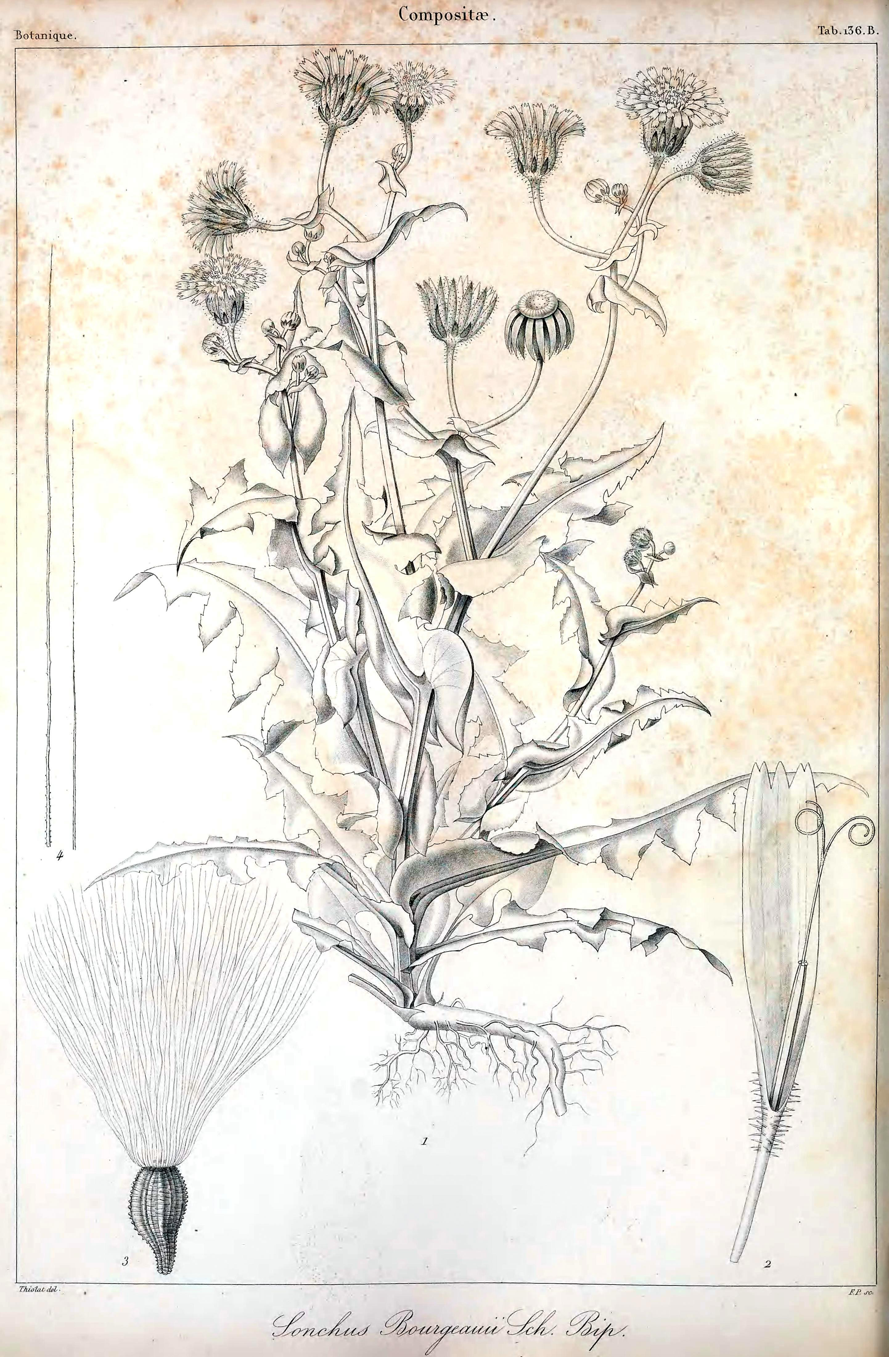 Sonchus bourgeaui in Histoire naturelle des Iles Canaries, vol. 2(2), p. 446-447, t. 136B - 1: Planta entera en tamaño natural; 2: Lígula; 3: Cipsela con vilano; 4: Pelo largo del vilano; 5: Pelo corto del vilano.